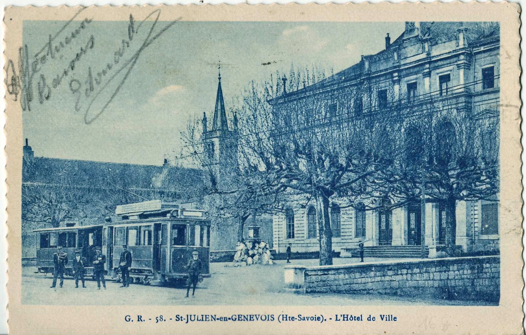 Carte postale ancienne éditée par G. R. n°58, L. Fauraz éditeur à Annemasse : SAINT-JULIEN-EN-GENEVOIS - L'Hôtel de Ville